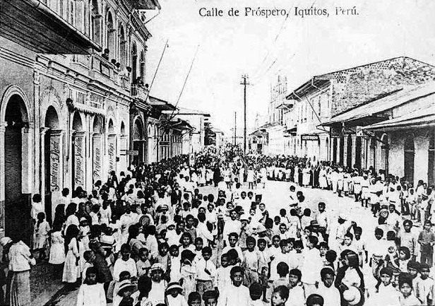 Calle Próspero de Iquitos en 1910